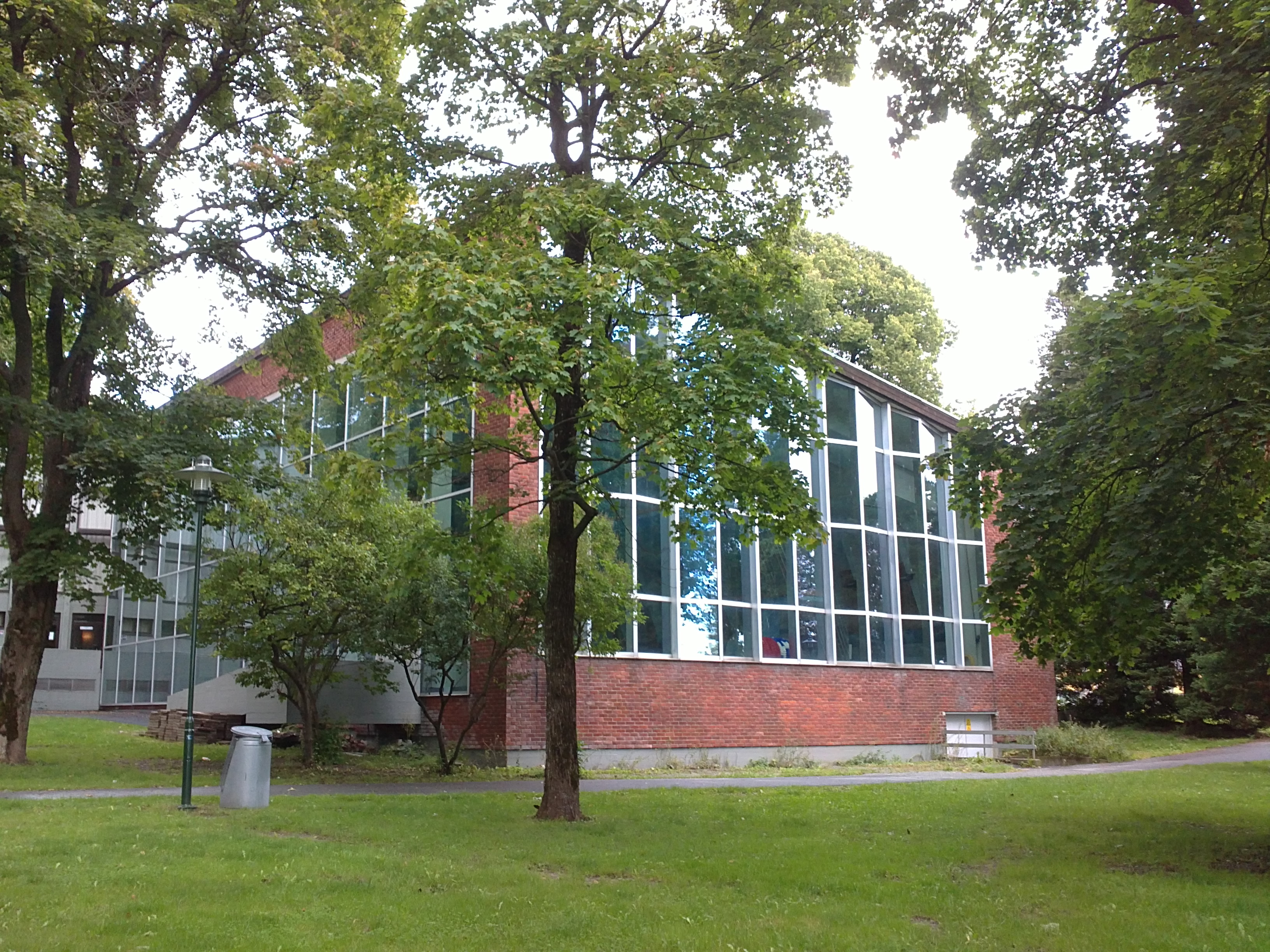 Bilde av Farrishallen, Larvik